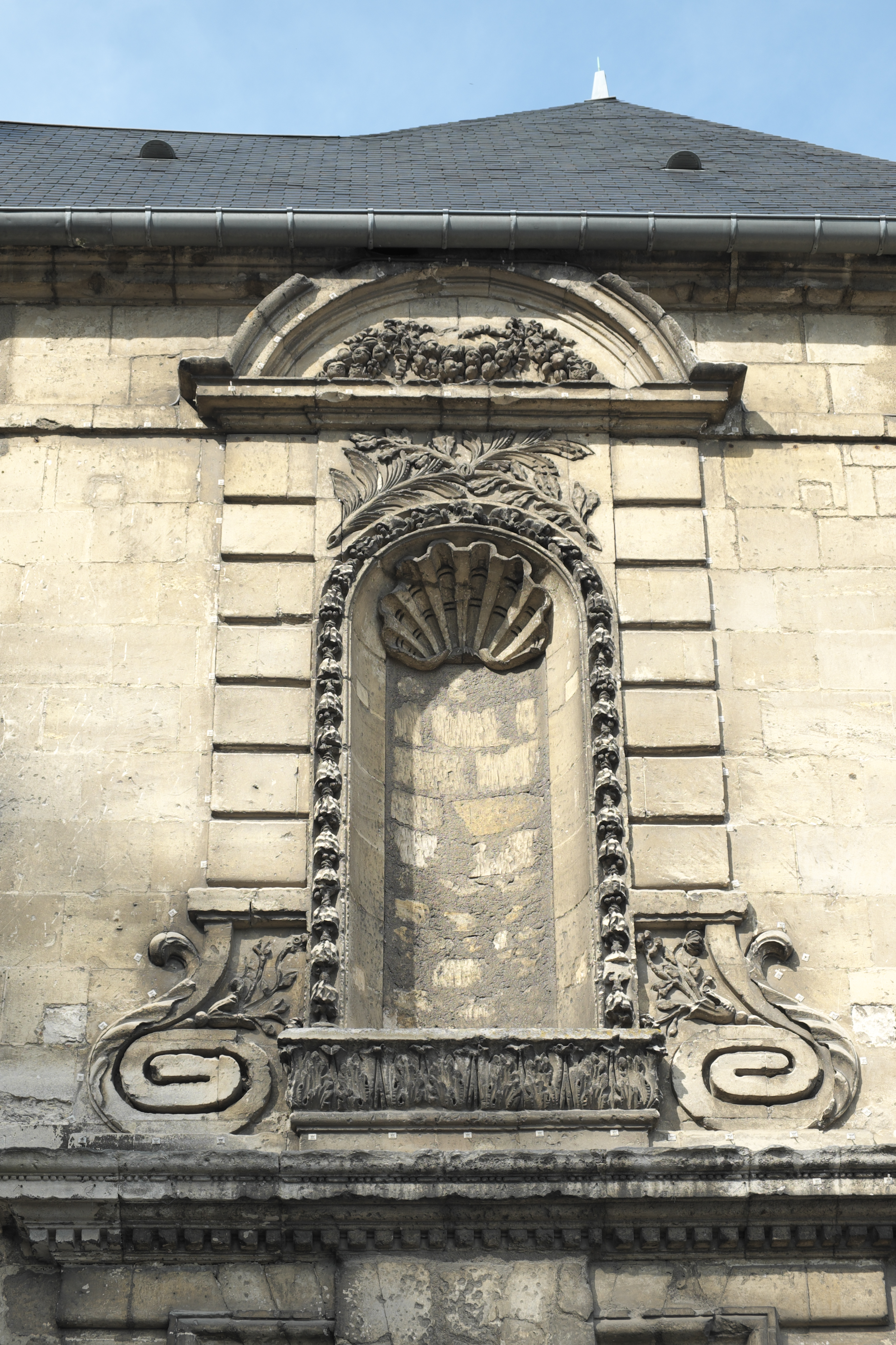 Ehemaliges Hôtel-Dieu an der Place Aubry/Place de la Cathédrale in Laon im Département Aisne/Picardie (Frankreich), Heiligennische